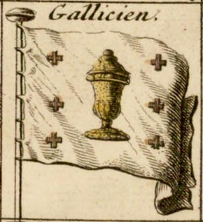 Bandeira de Galiza na táboa de pavillóns navais de todo o mundo de Petrus Schenk, publicada en Ámsterdam no ano 1711 e titulada Schouw-park aller Scheeps-Vlaggen des geheelen Water-Waerelds ou Tableau des Pavillons de Mer.